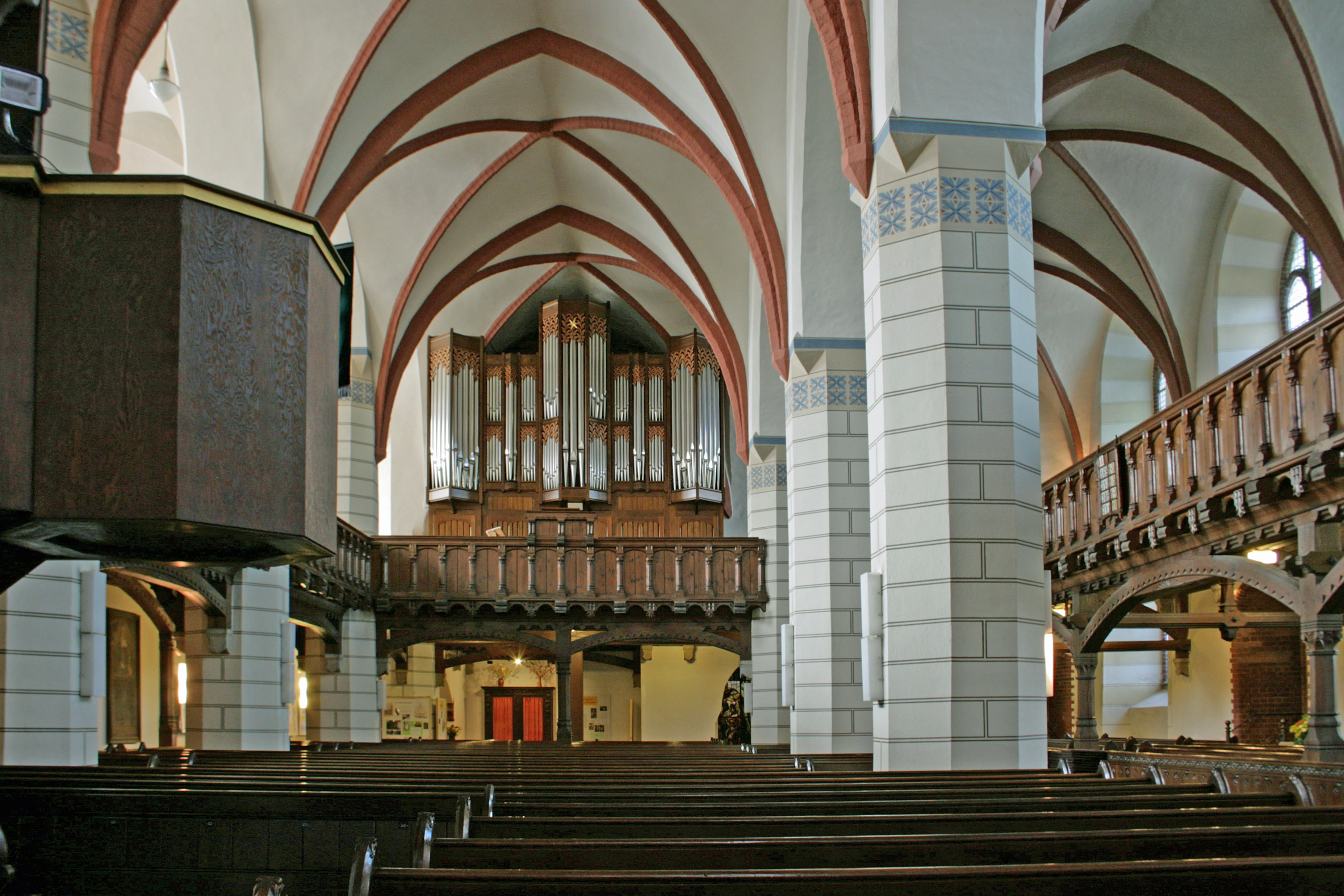 Nikolaikirche in Löbau